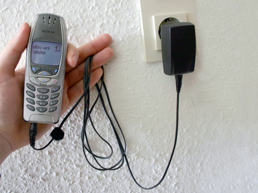 Nokia 6310a Foto: Canon EOS 300D